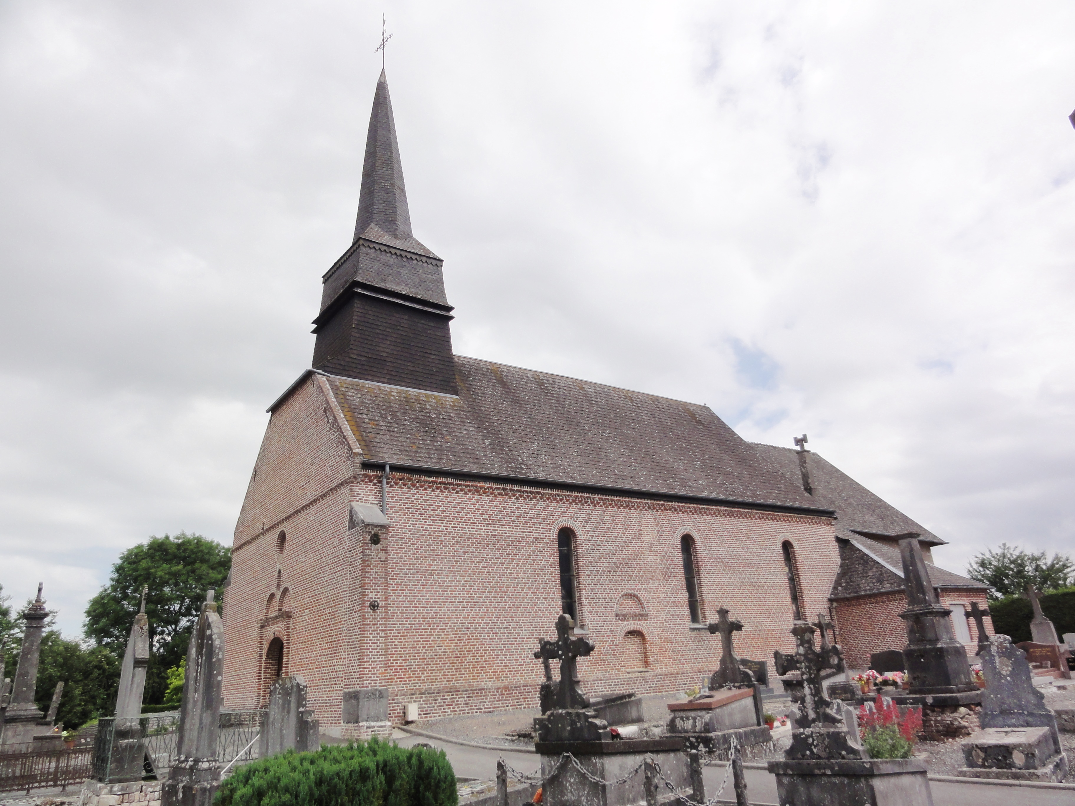 Besmont (Aisne) église